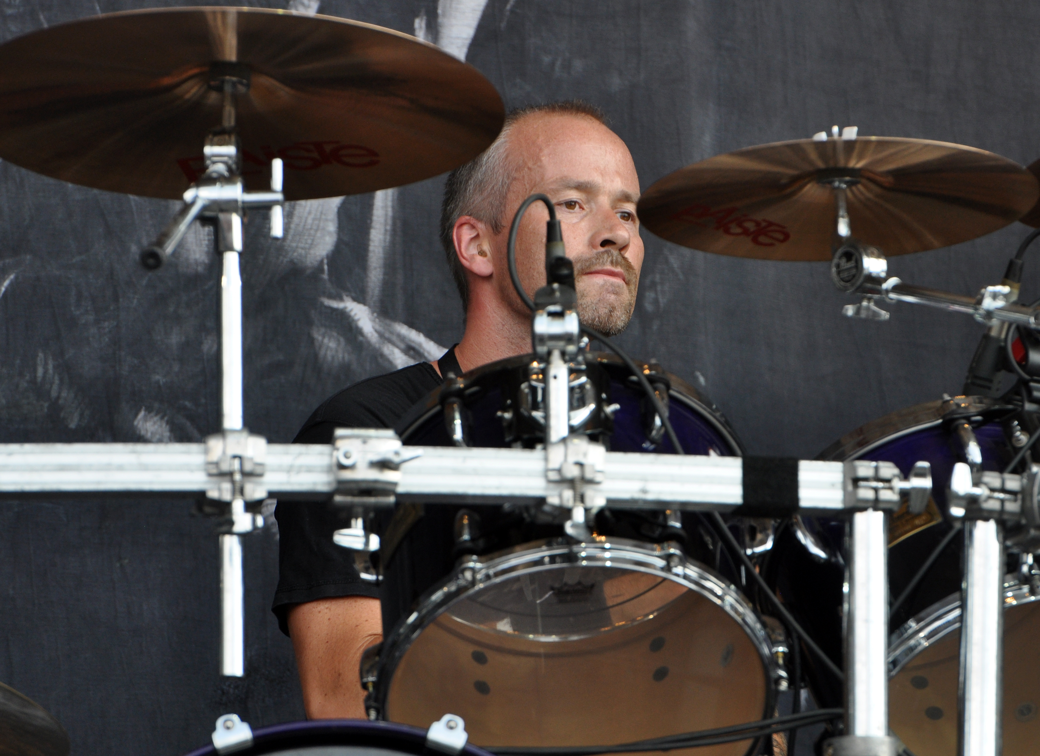 02-08-2014-Bård G. Eithun with Emperor at Wacken Open Air 2014-JonasR